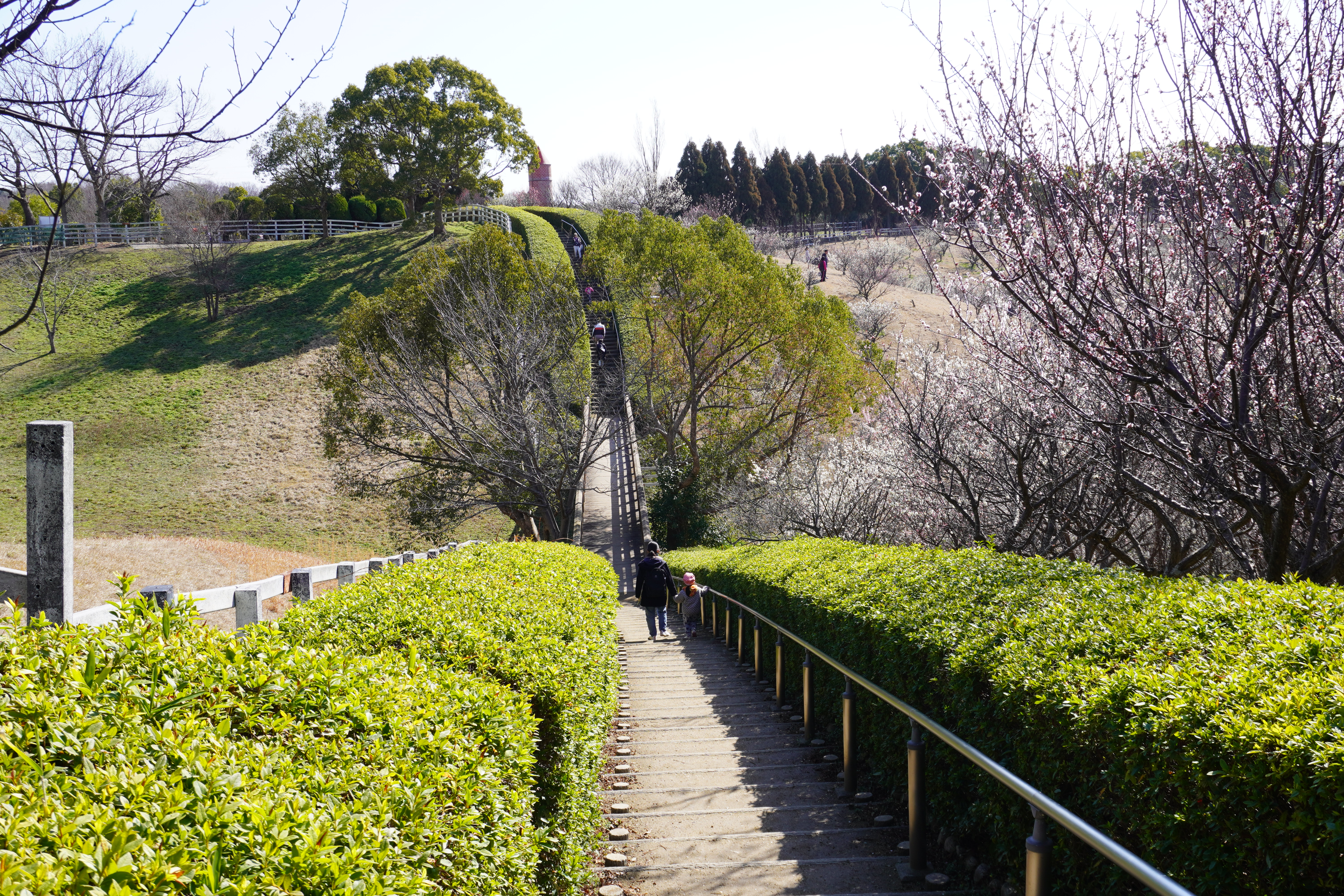 石ケ谷公園